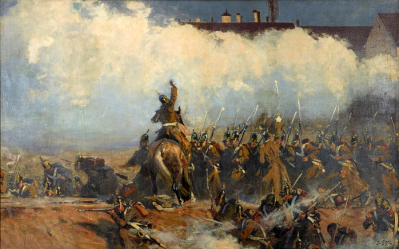 Rosyjska piechota w natarciu, prowadzona przez konnego dowódcę” fragmentu "Panoramy Siedmiogrodzkiej".